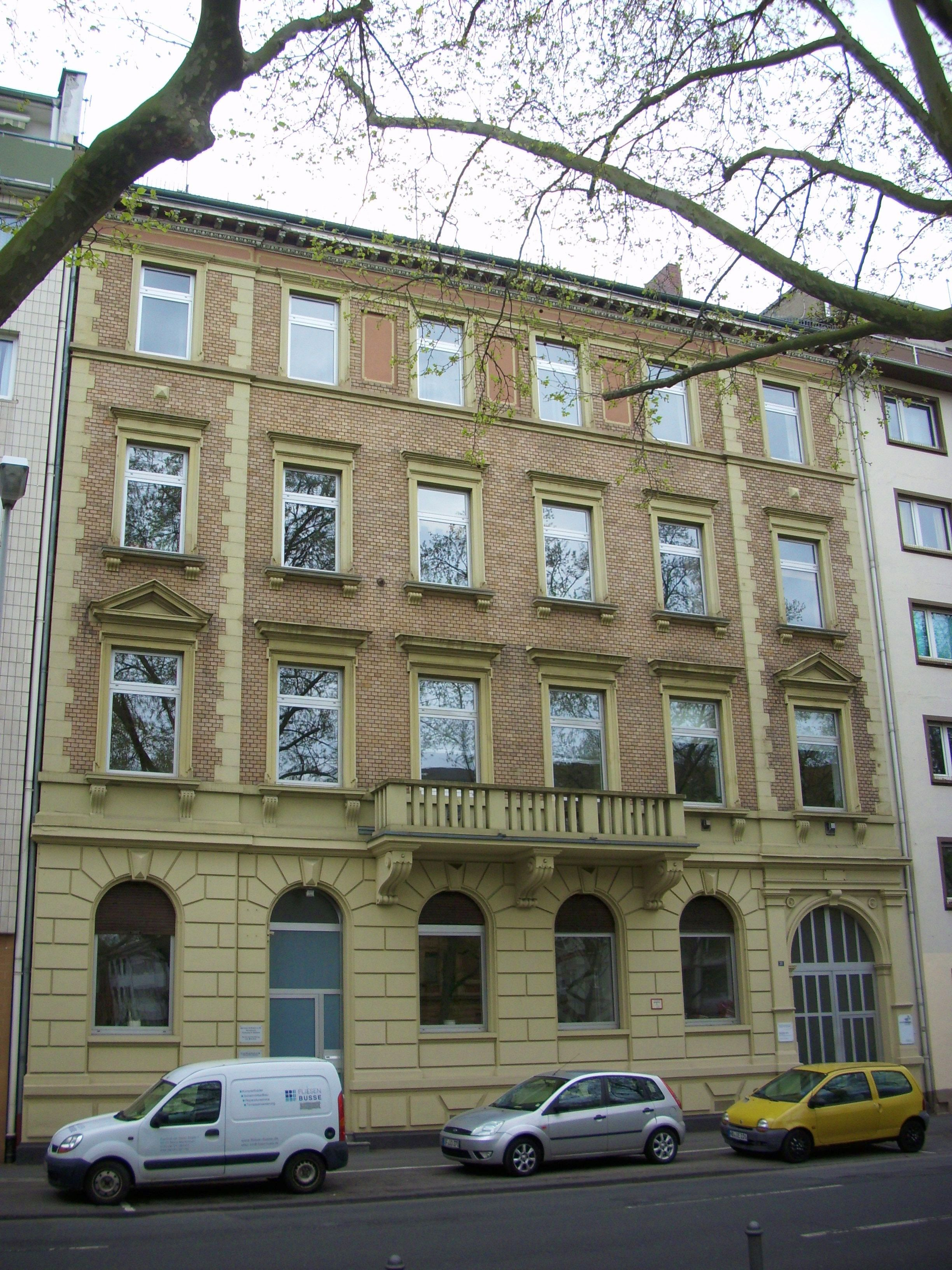 Viergeschossiges Wohnhaus, ehemals Bankhaus Fulda, Dachabschluss mit Kranzgesims und Eierstab, 1881, Architekt Haenlein